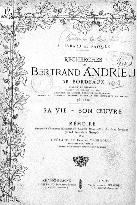 Frontispice de l’ouvrage « Recherches sur Bertrand Andrieu » par Alexis Évrard de Fayolle.